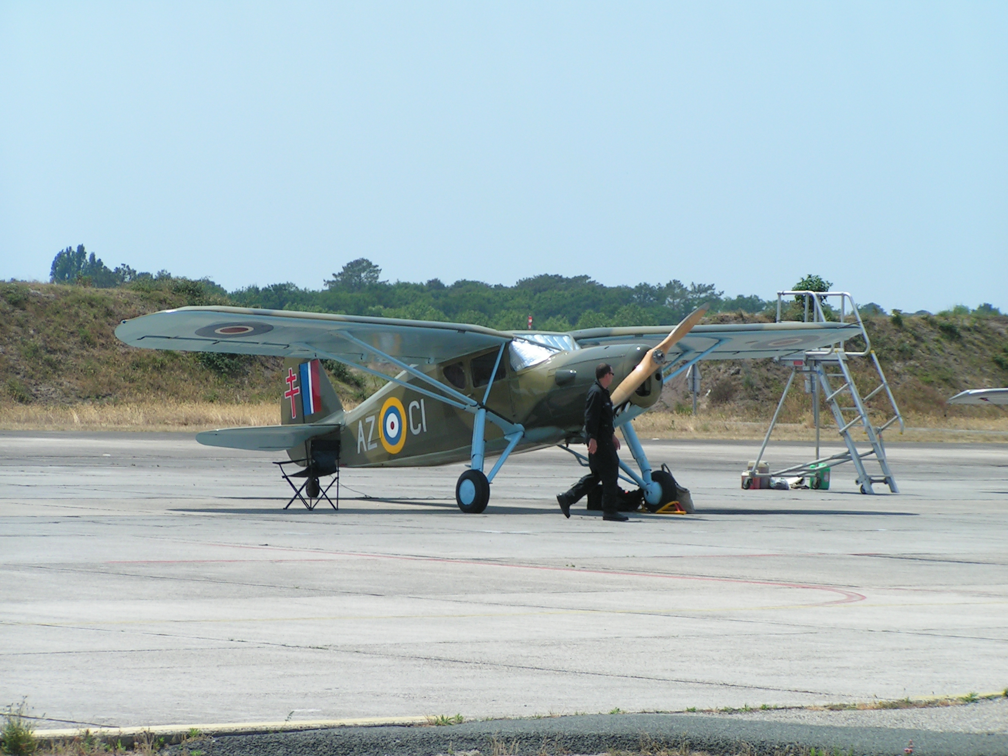 Fairchild VC-61K-FA Argus III (24R-46A) - F-AZCI (propriétaire Courtot Jean-Michel)